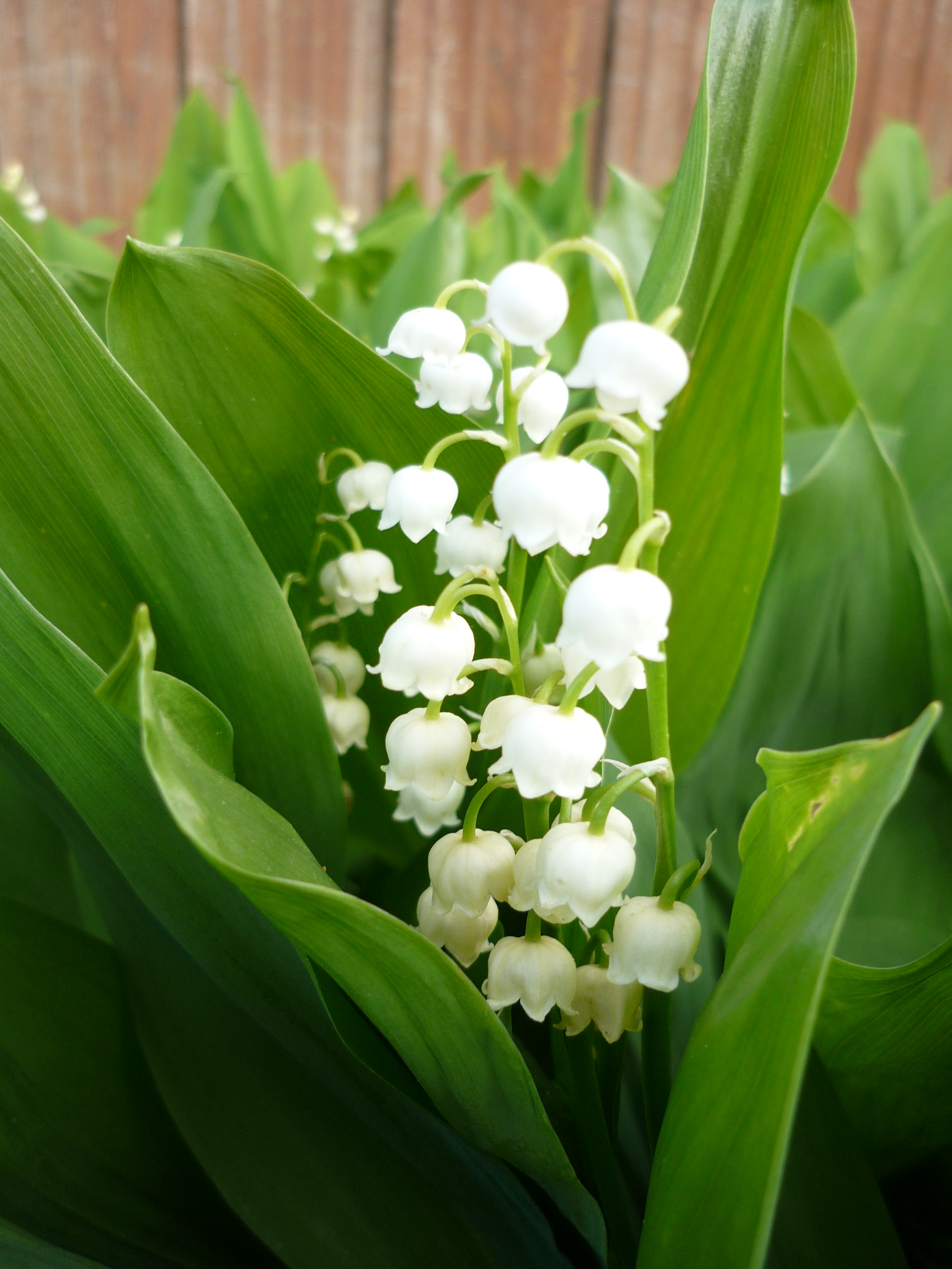 Одомашненный ландыш.